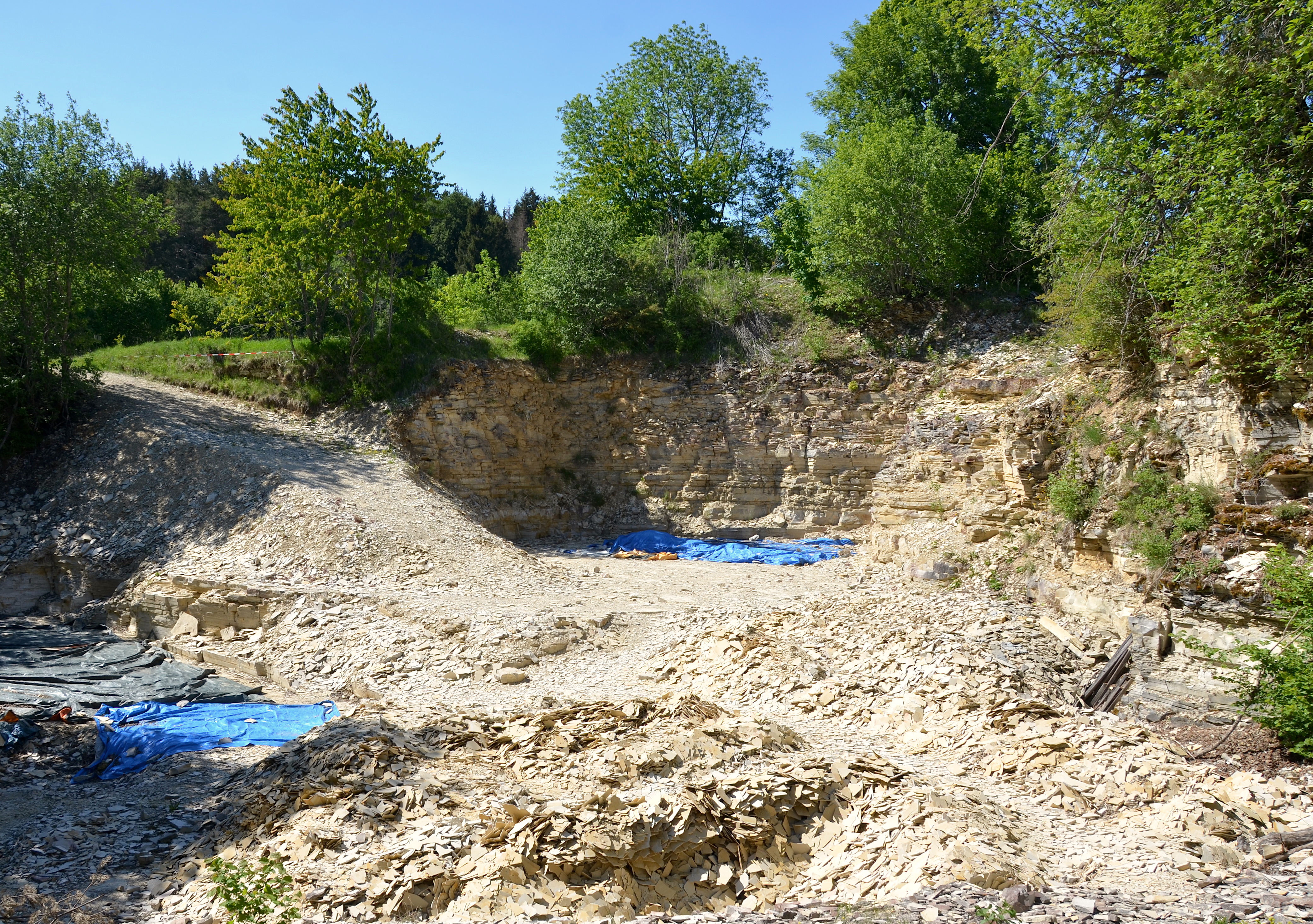 Plattenkalk-Steinbruch im Naturschutzgebiet Westerberg bei Nusplingen, Wasserschutzgebiet Scheibenbühlquellen, Naturraum Hohe Schwabenalb, Naturpark Obere Donau, Vogelschutzgebiet Südwestalb und Oberes Donautal, FFH-Gebiet Östlicher Großer Heuberg, Biotopkomplex Gewann Steinbühl